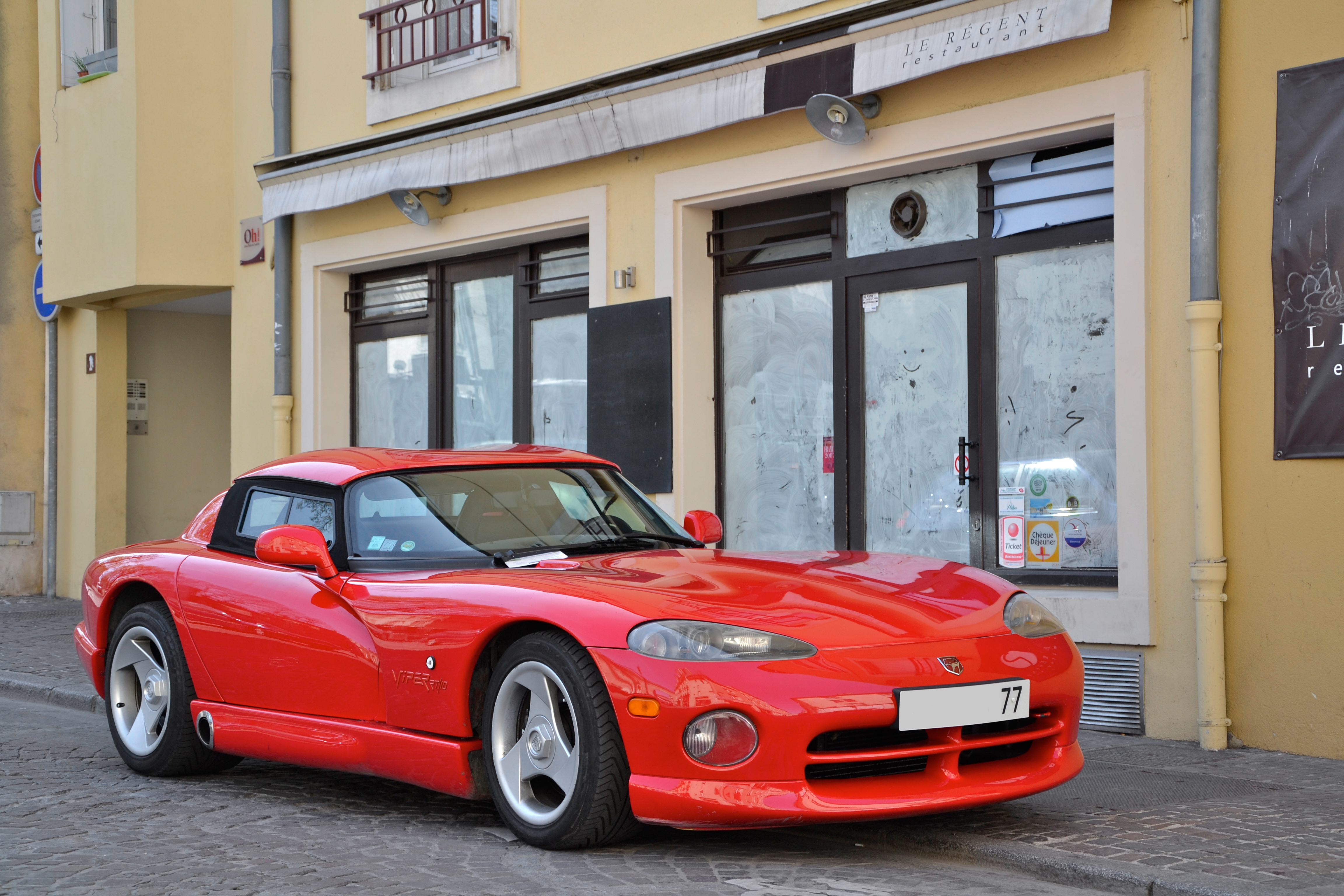 Dodge Viper RT/10